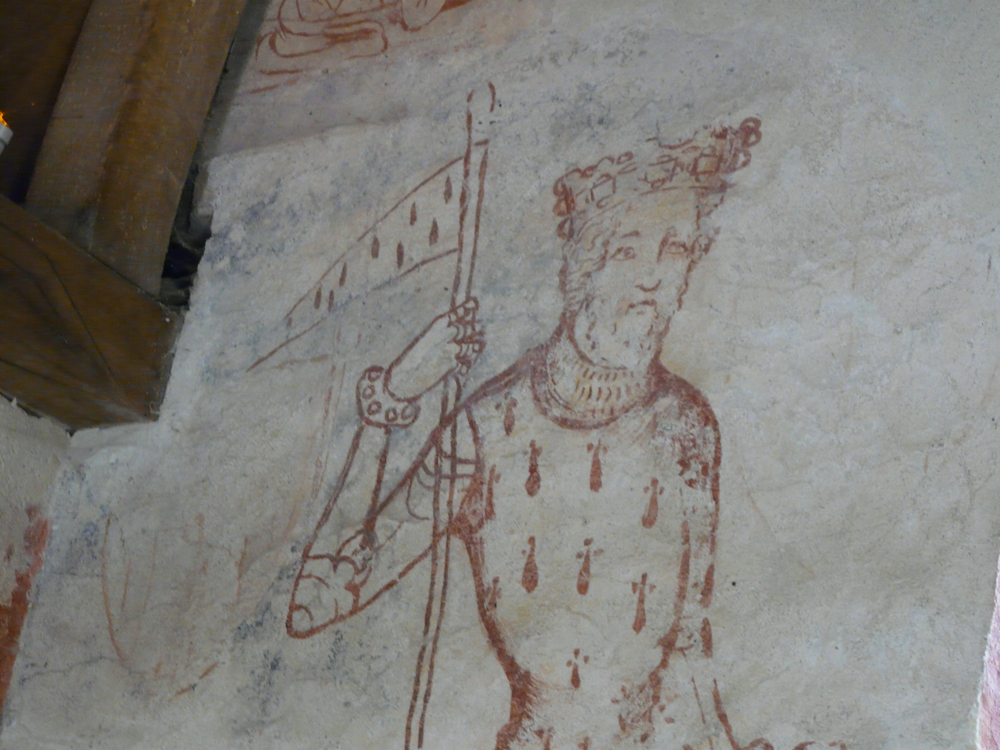 Peintures murales à gauche de l'autel chapelle saint Léonard